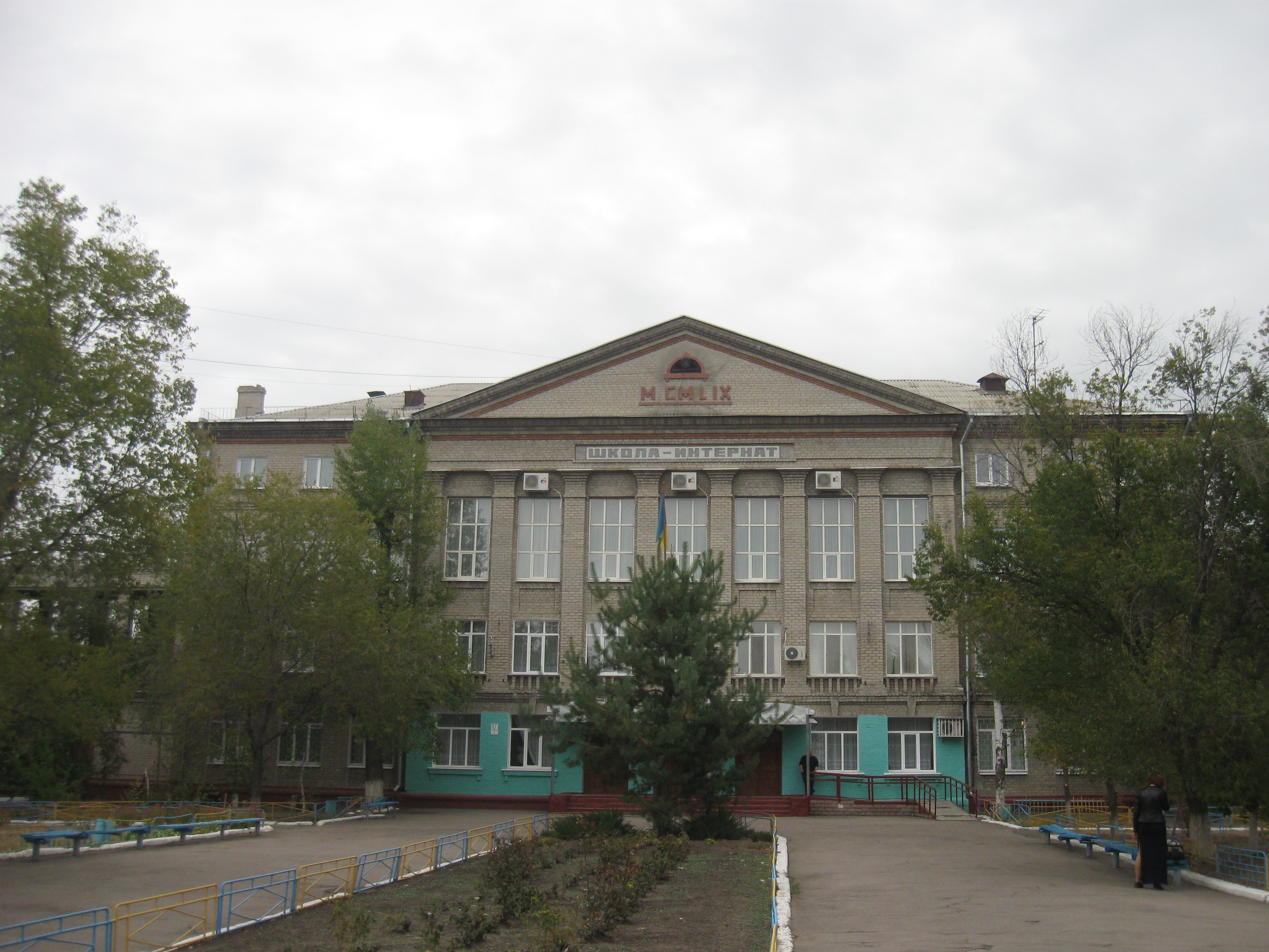 Школа-интернат города Северодонецка